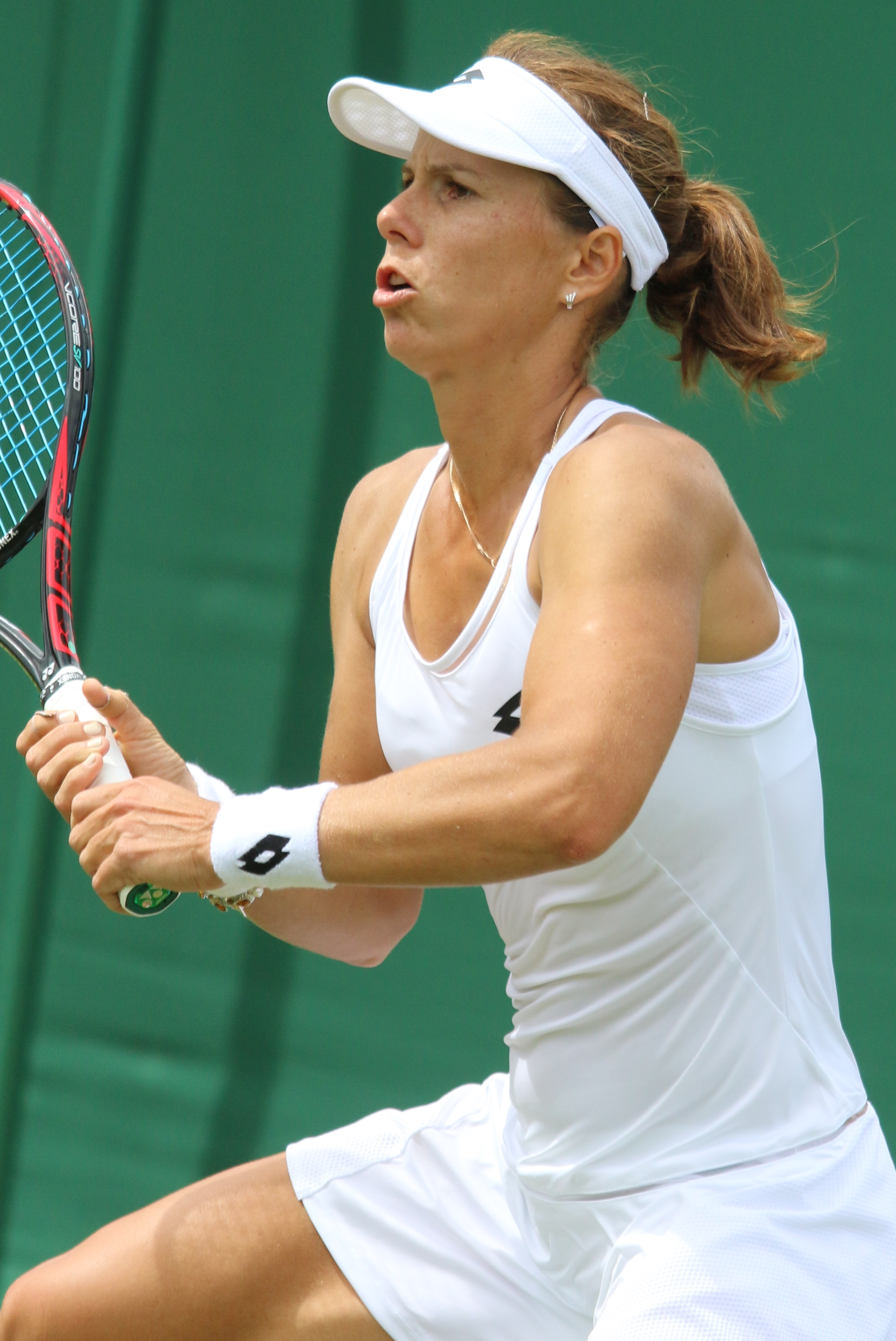 Lepchenko WM17 (7)